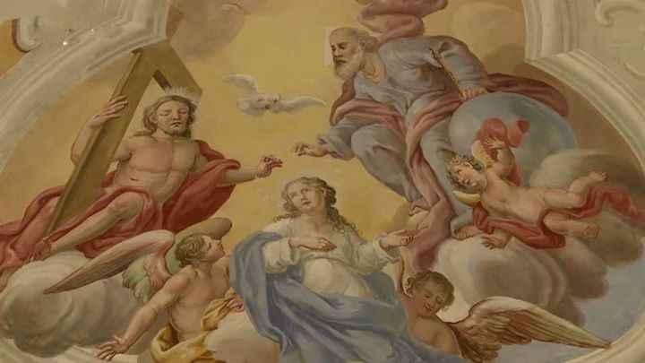 Assunzione al Cielo di Santa Maria - Affresco